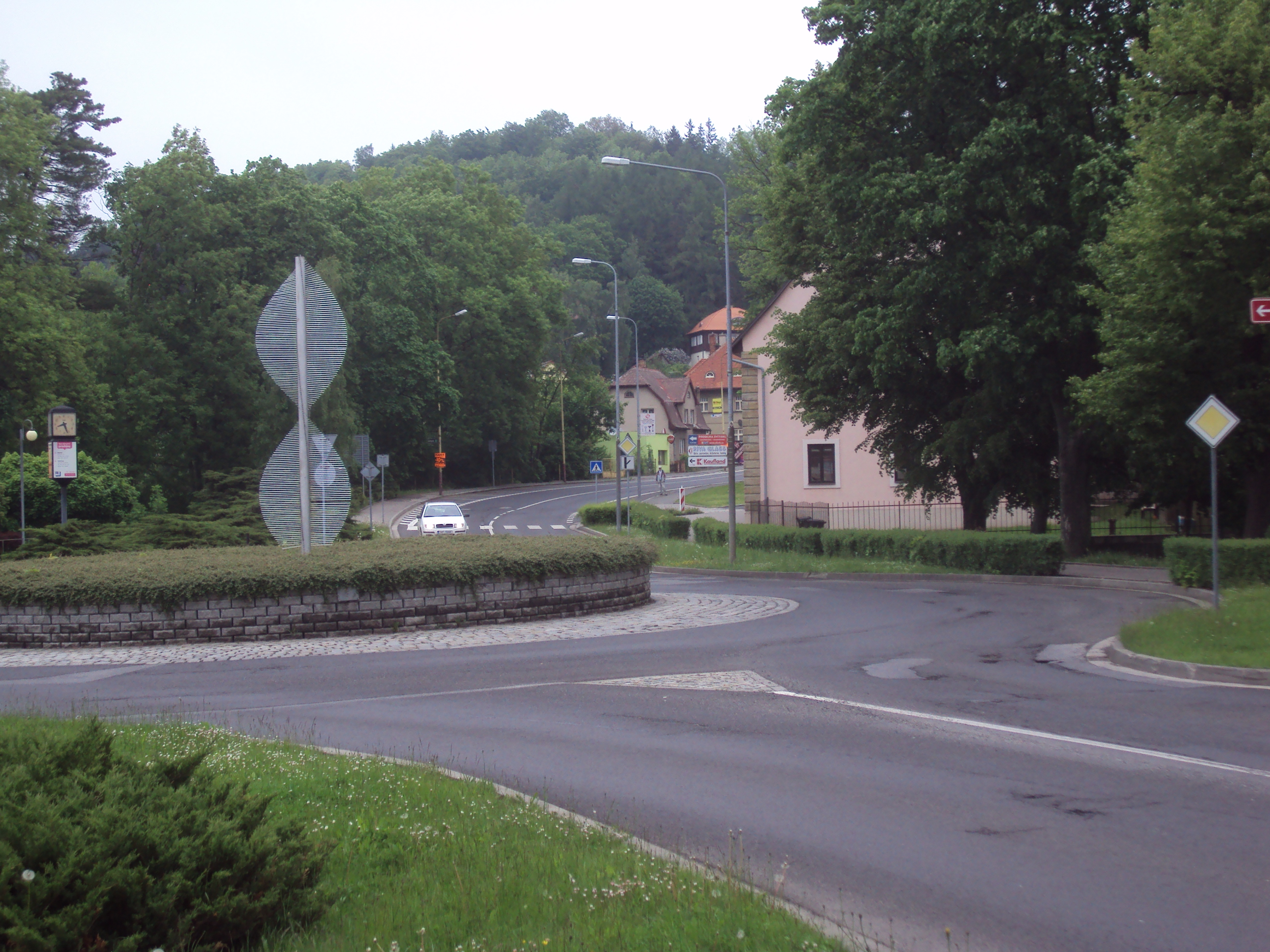 Borský vrch od jihu, z města Nový Bor